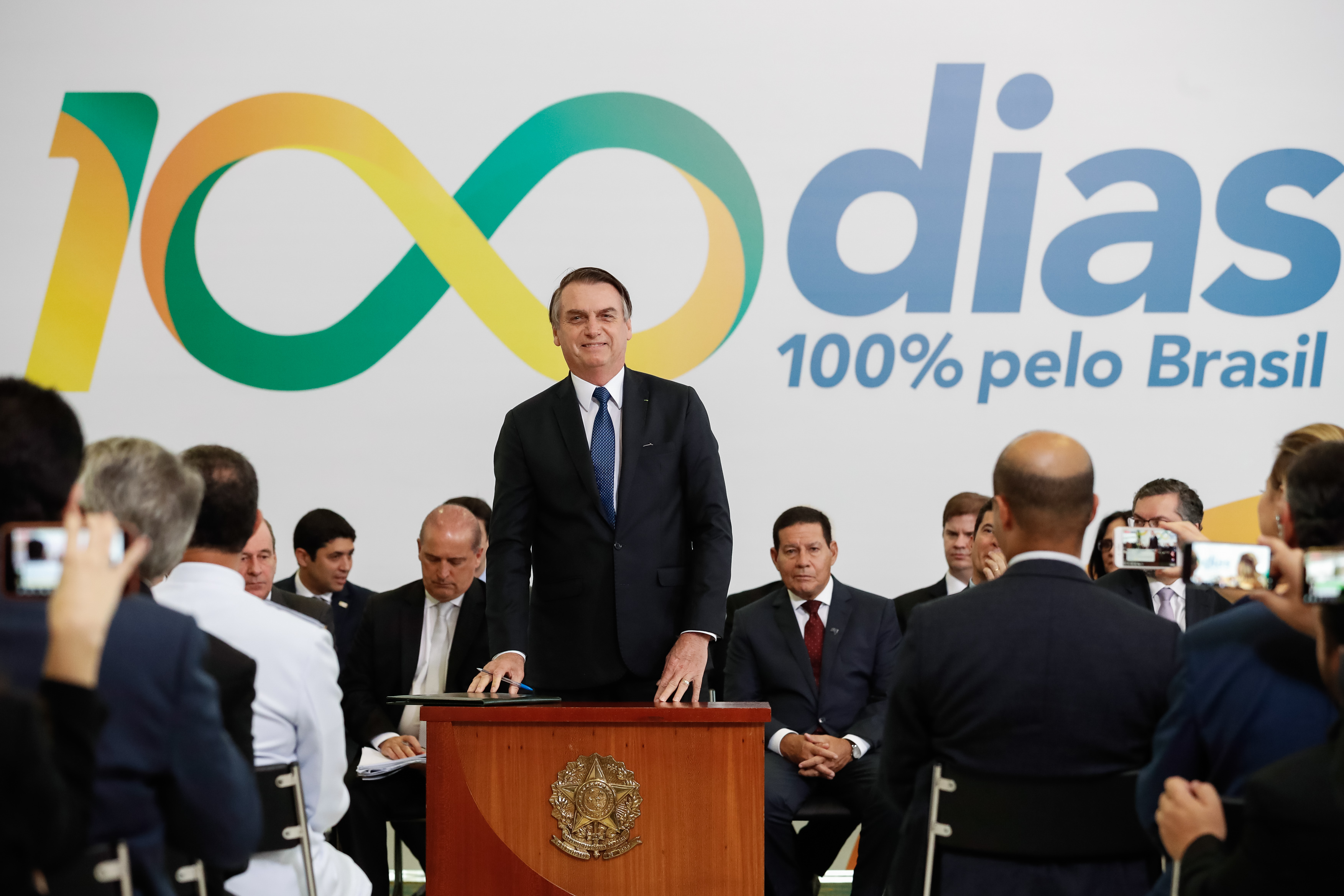 (Brasília - DF, 11/04/2019) Presidente da República, Jair Bolsonaro assina decreto. Foto: Alan Santos/PR